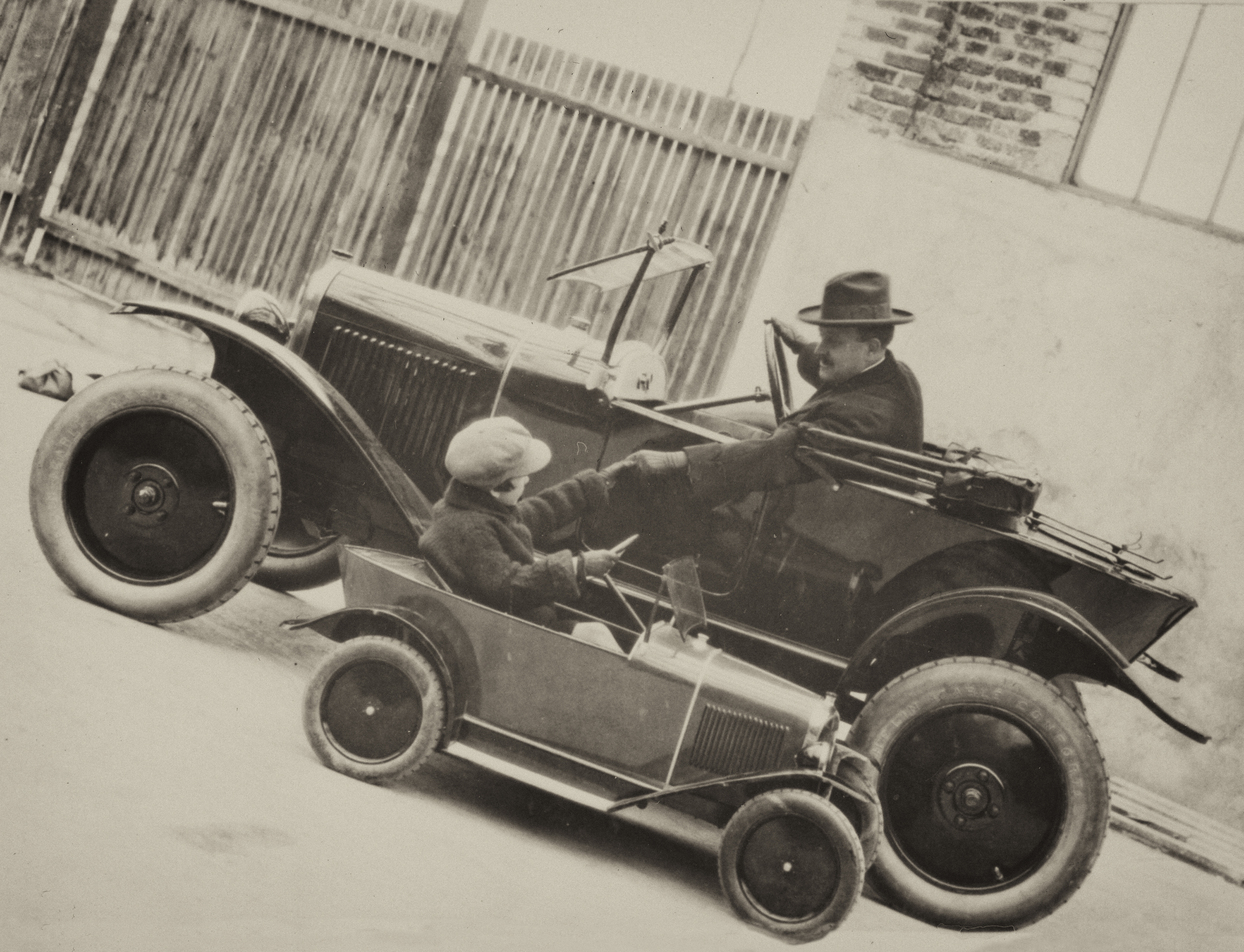 Rencontre d' une Citroen 5HP T2 et d' une Citroenette - Document publicitaire Novembre 1924